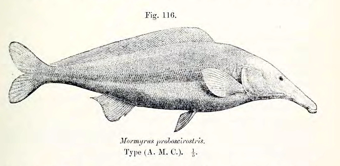 Rume-Rüsselfisch (Mormyrus rume) Valenciennes, 1847 (Synonym Mormyrus proboscirostris, Boulenger [G. A.] 1898)